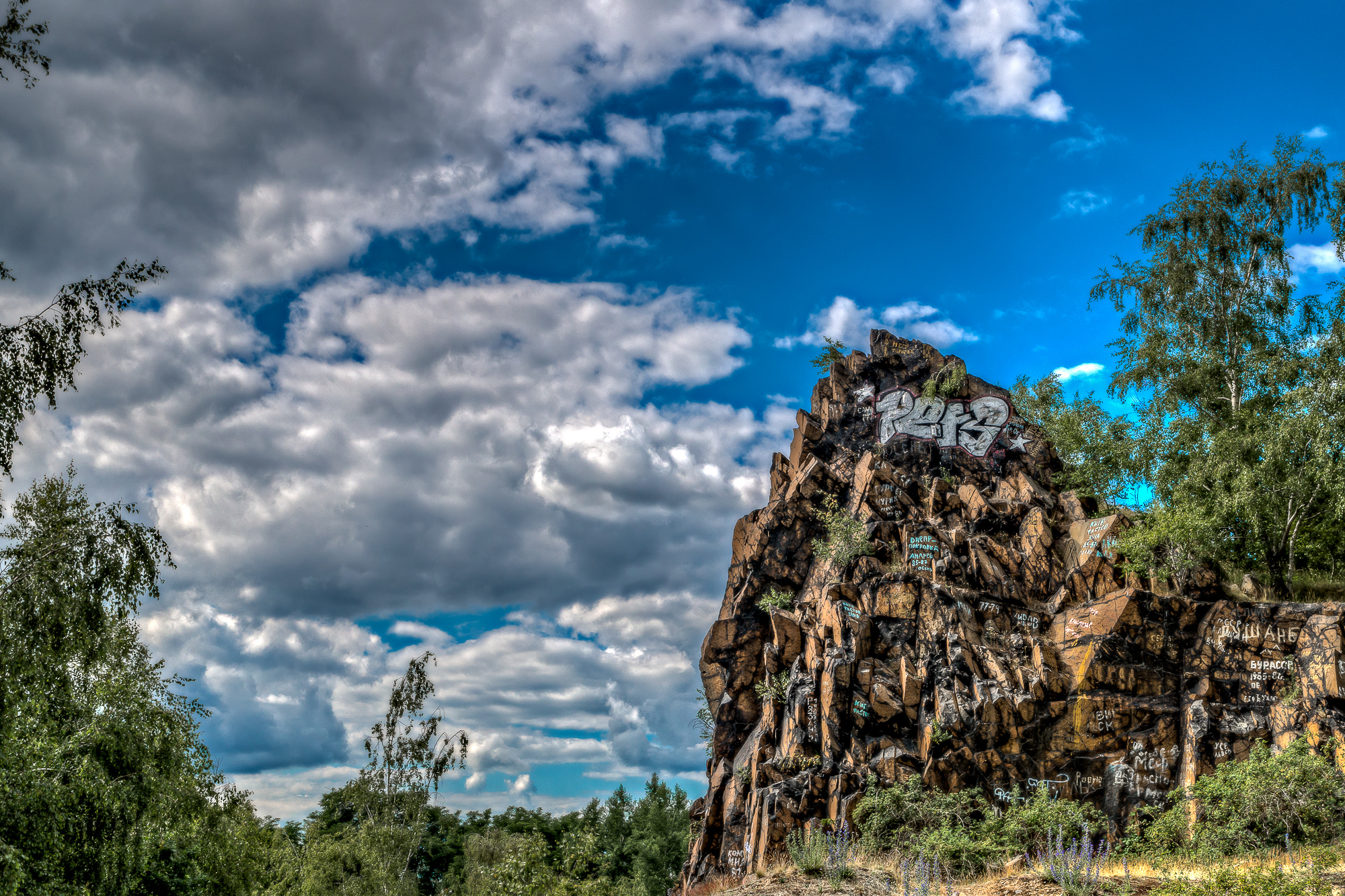 Naturschutzgebiet L 55 „Am Spitzberg“ bei Lüptitz im Landkreis Leipzig